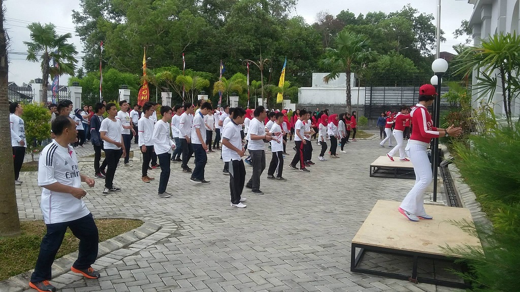 Senam Pagi STiKOM